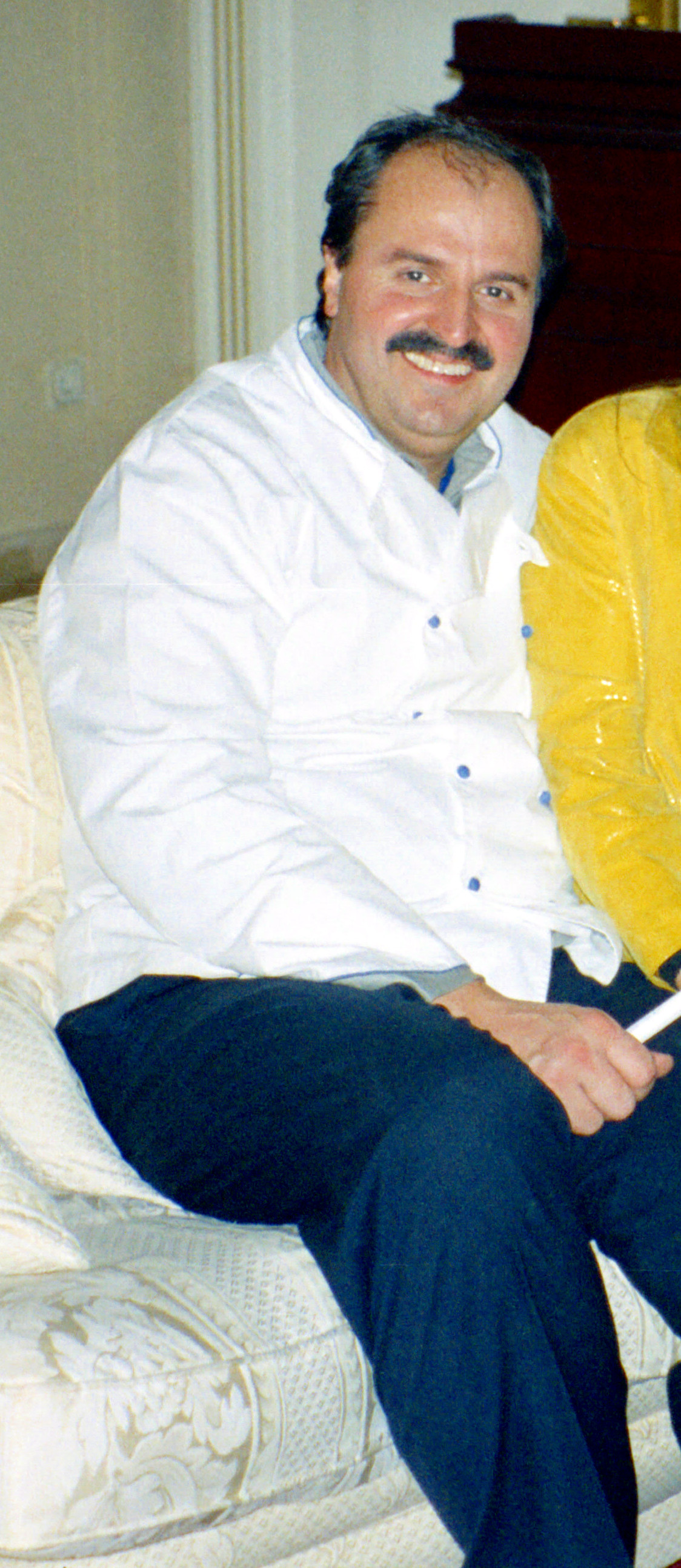 Johann Lafer auf der Stromburg, mit Filmscanner digitalisiert